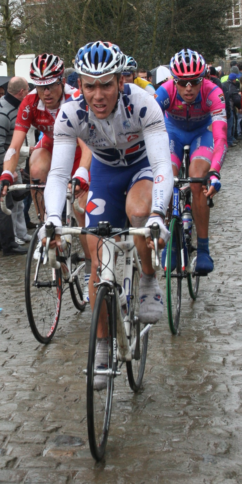 Philippe Gilbert op de Koppenberg in de Ronde van Vlaanderen 2008